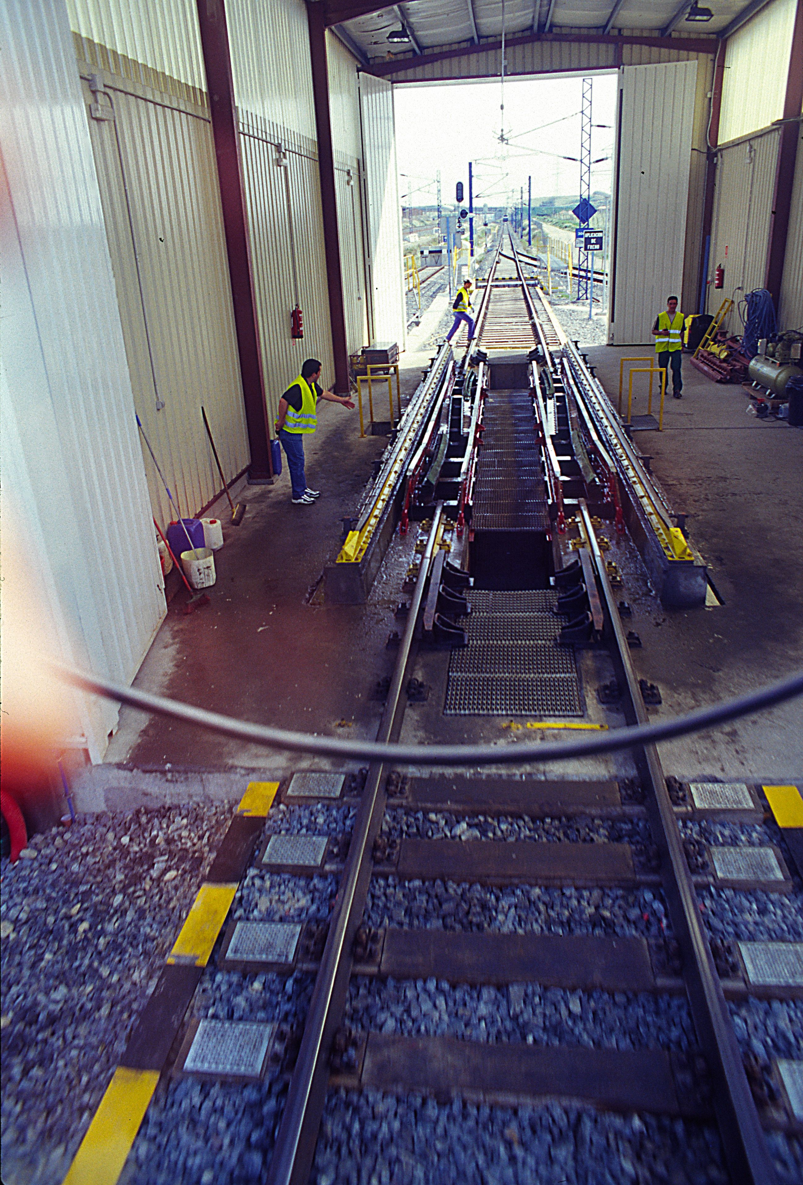 Talgo-Spurwechselanlage bei Lérida von der Regelspurseite. Die Spurwechselanlage ist zwangsläufig auch eine Systemtrennstelle, doch die Fahrleitung führt durch. Abgebügelt wird nur, weil unter 3 und 25 kV unterschiedliche Paletten genutzt werden. Die Spurwechselanlage wurde zwischenzeitlich mit dem Baufortschritt der Schnellfahrstrecke Madrid–Barcelona–Französische Grenze wieder abgebaut, nachdem die Hoch­geschwin­dig­keits­strecke durchgehend fertiggestellt war.